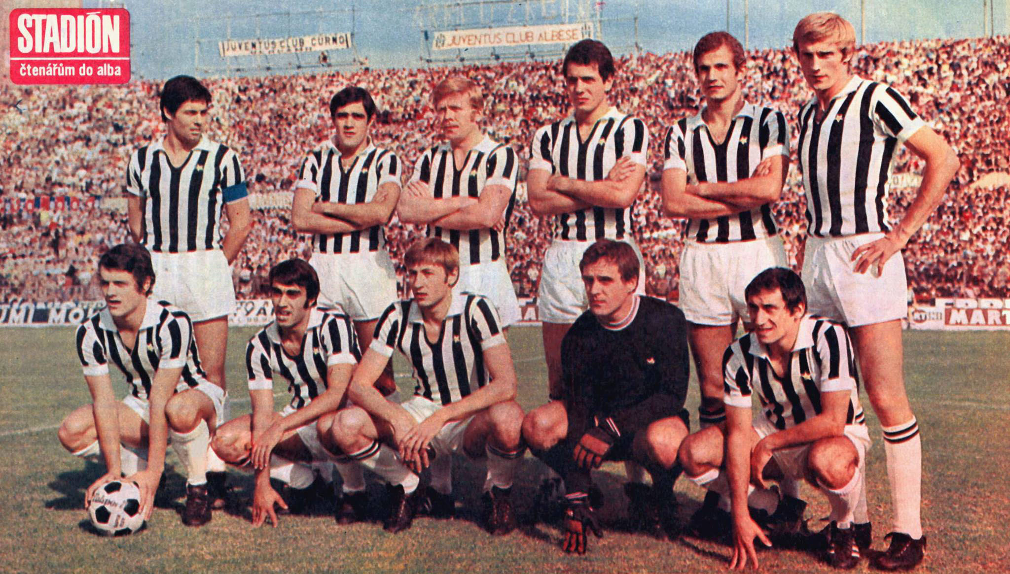 Torino, stadio Comunale, 7 ottobre 1970. La formazione della Juventus scesa in campo in occasione della sfida interna contro il Bologna (0-0) valevole per la 2ª giornata del campionato italiano di Serie A 1970-71. Da sinistra, in piedi: S. Salvadore (capitano), A. Cuccureddu, H. Haller, R. Bettega, L. Spinosi, F. Morini; accosciati: F. Capello, P. Anastasi, G. Marchetti, R. Tancredi, G. Furino.